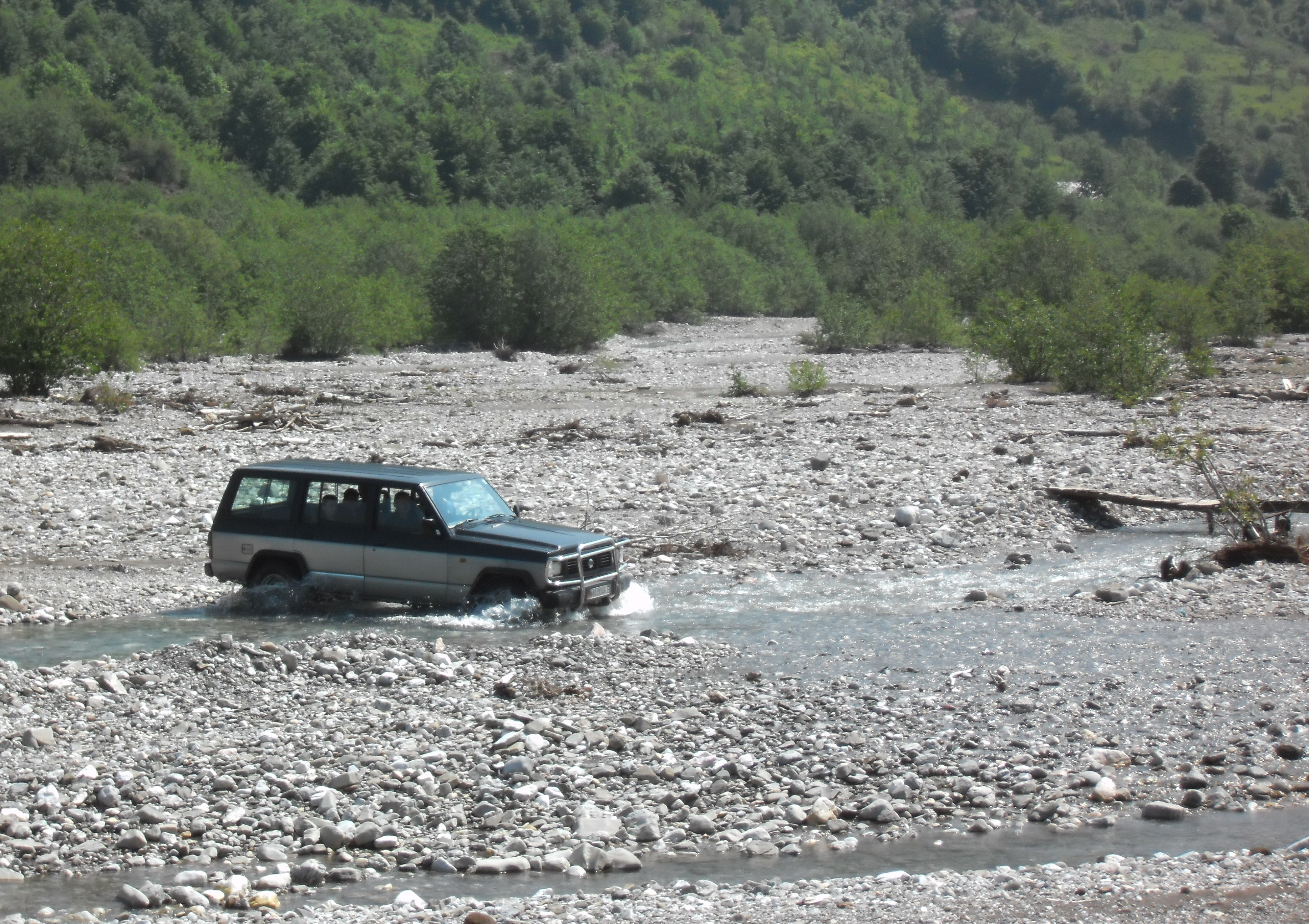 Die übliche Flussbett-Durchquerung in Vermosh (Albanien), da es keine Brücken gibt.